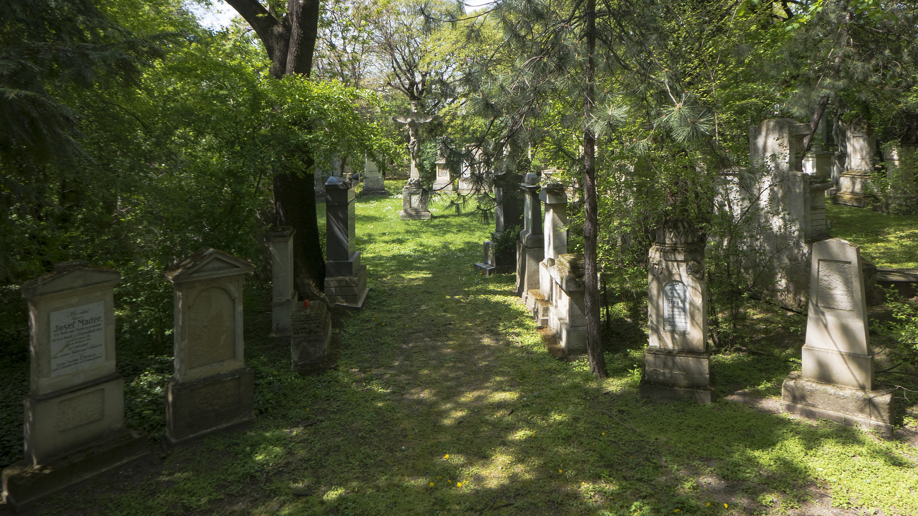 Waldmüllerpark in Wien 10